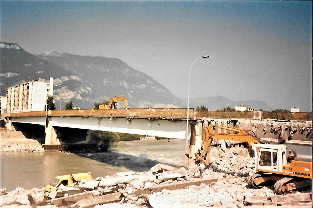 Démolition du 2ème pont du Vercors à Fontaine